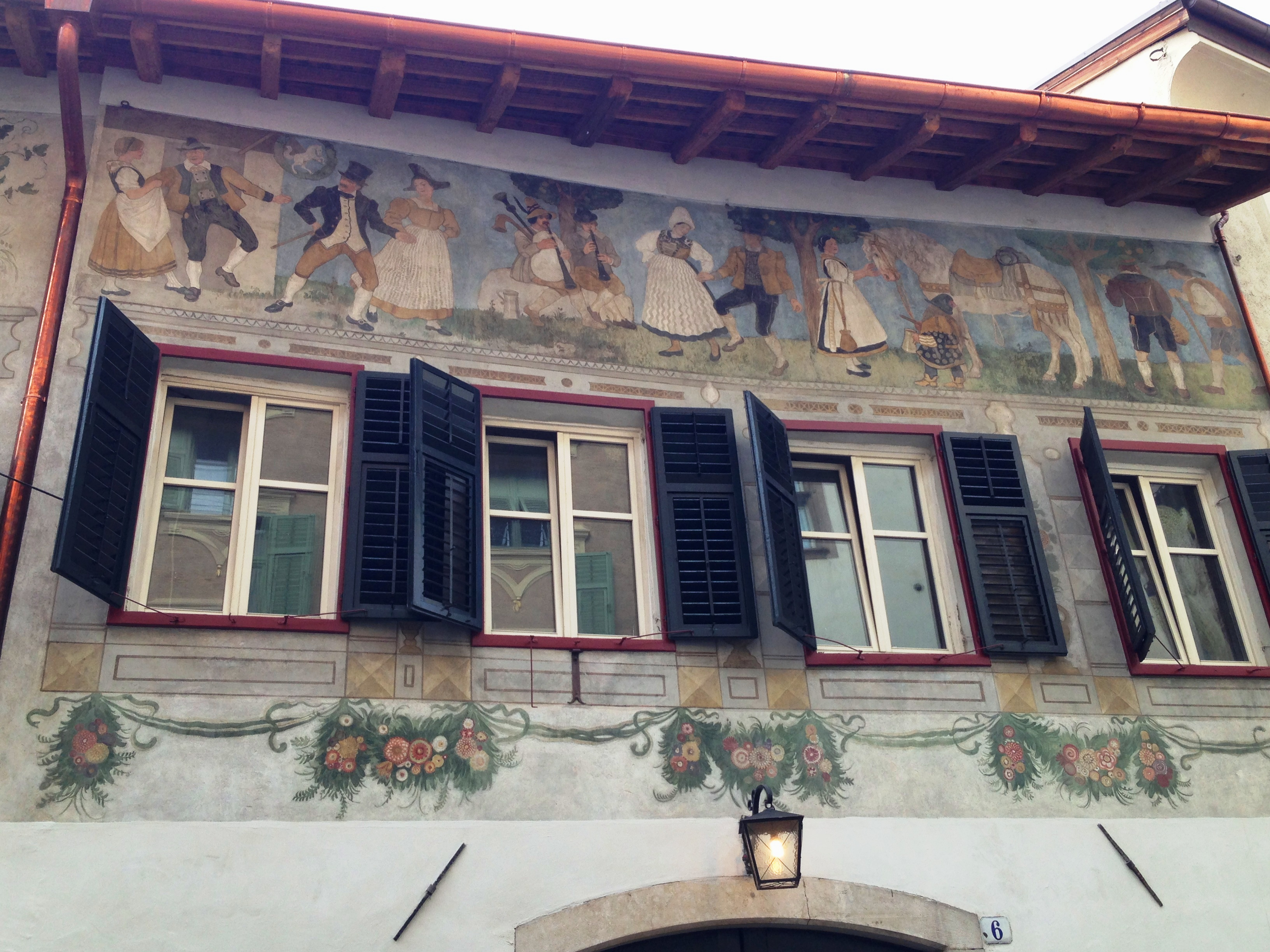 Weißes Rössl Bozen - 2014